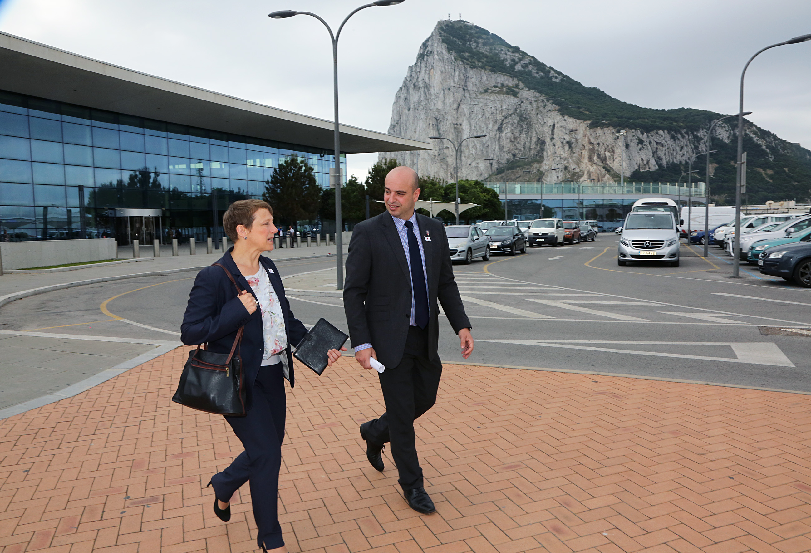 05-May-2017 Visita al Peñón de la eurodiputada por #Gibraltar Clare Moody